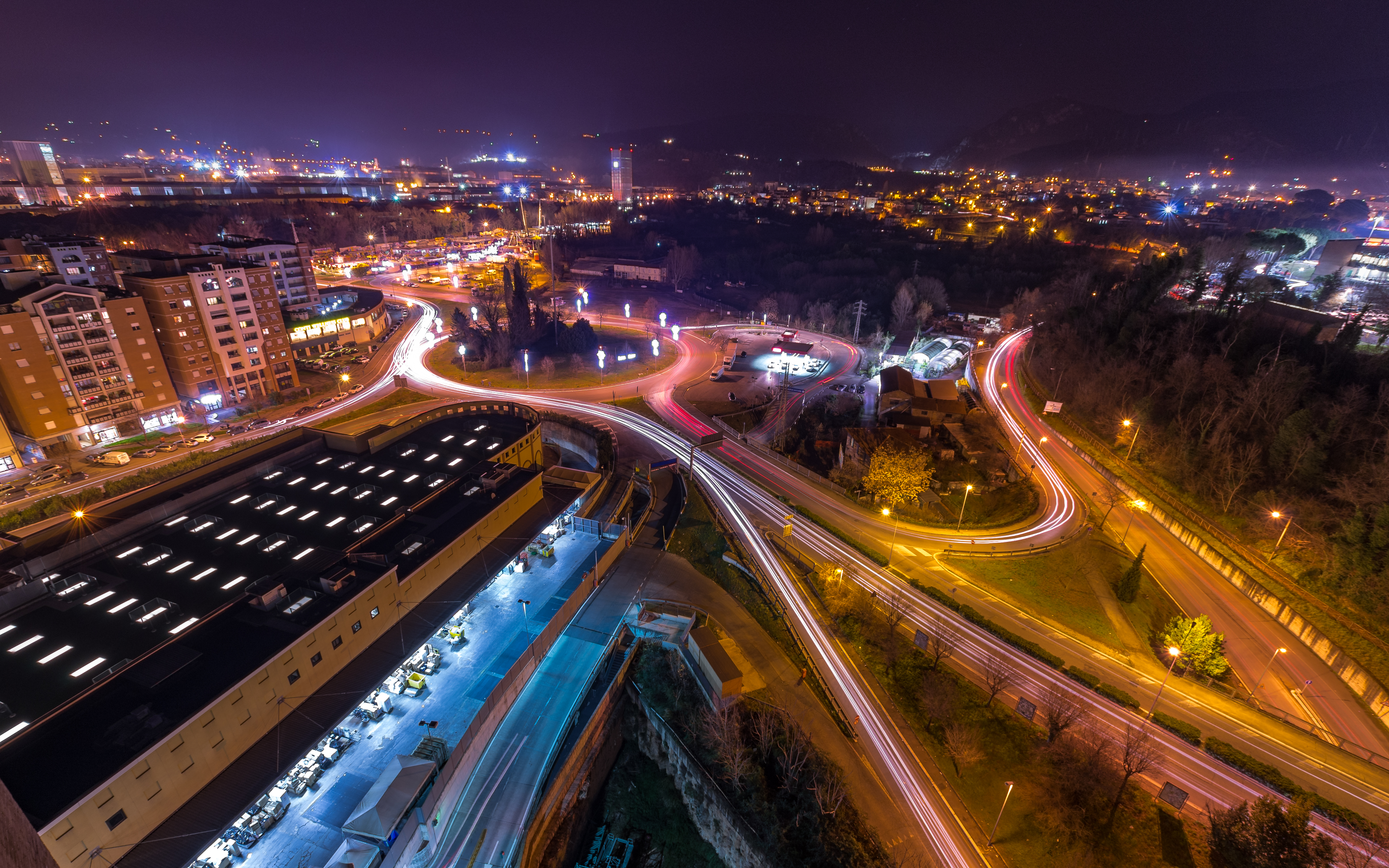 Vista di un quartiere moderno di Terni in notturna.